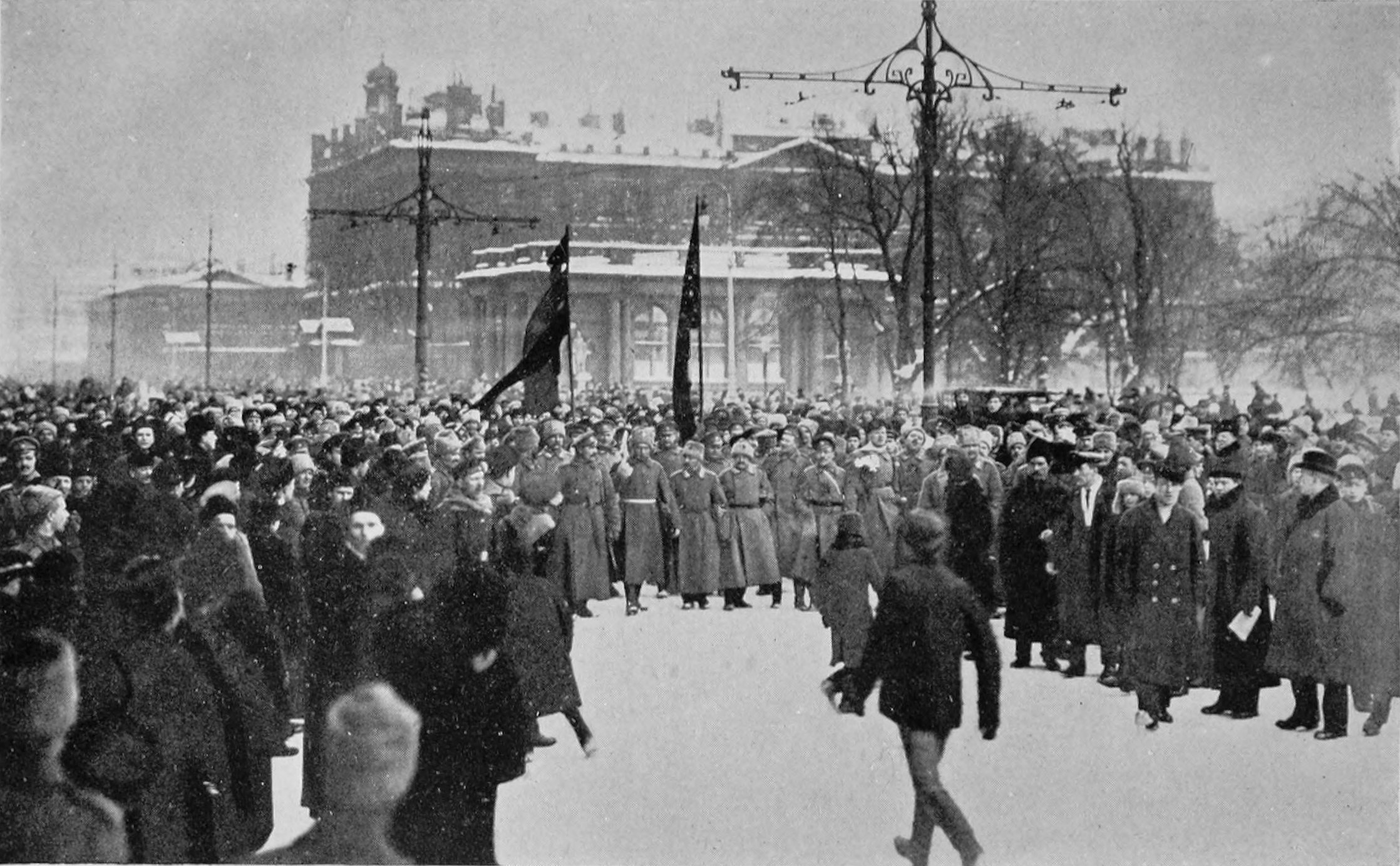 Manifestación en el Nevsky Prospekt, Petrogrado, encabezada por soldados, marzo de 1917.